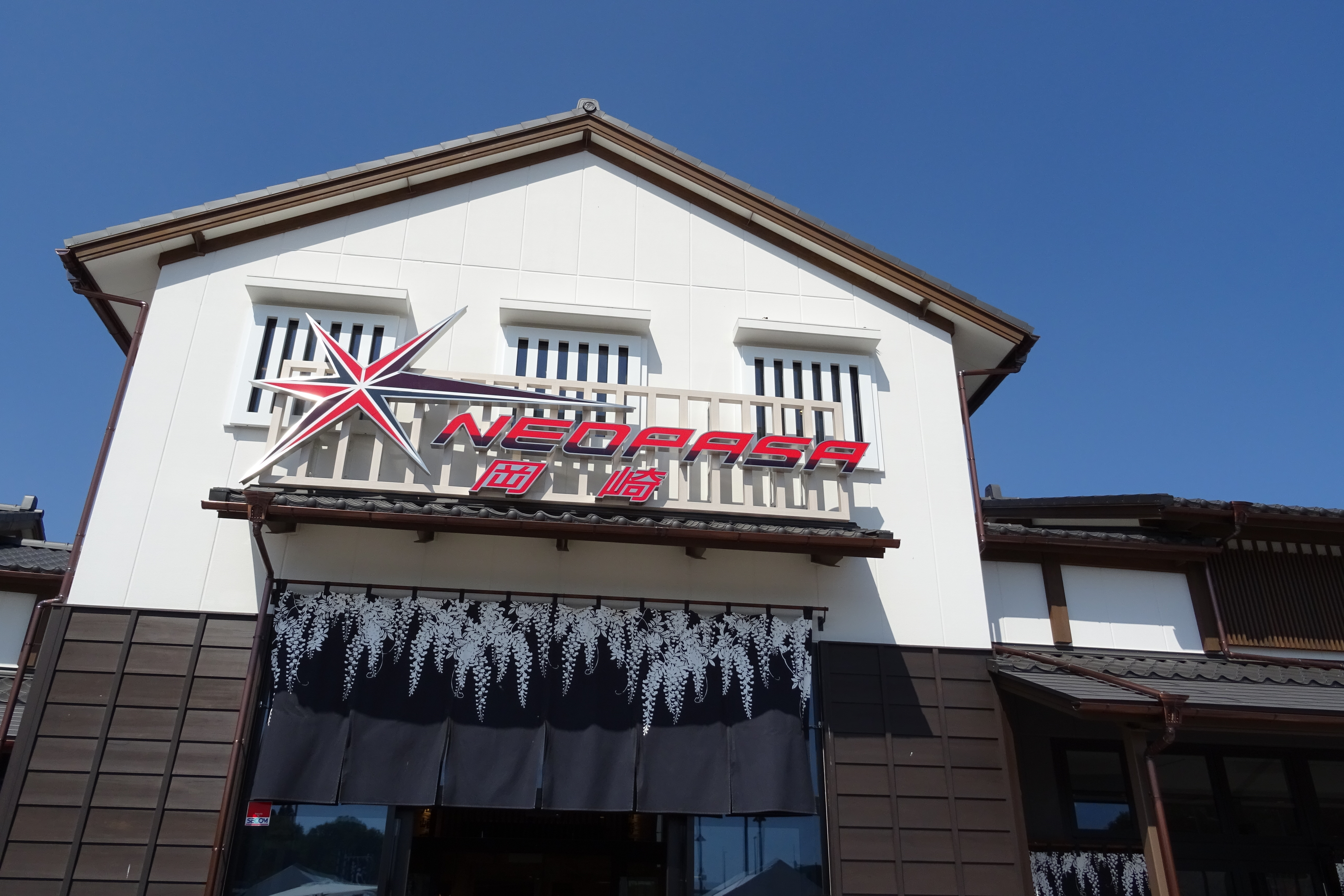 岡崎サービスエリア